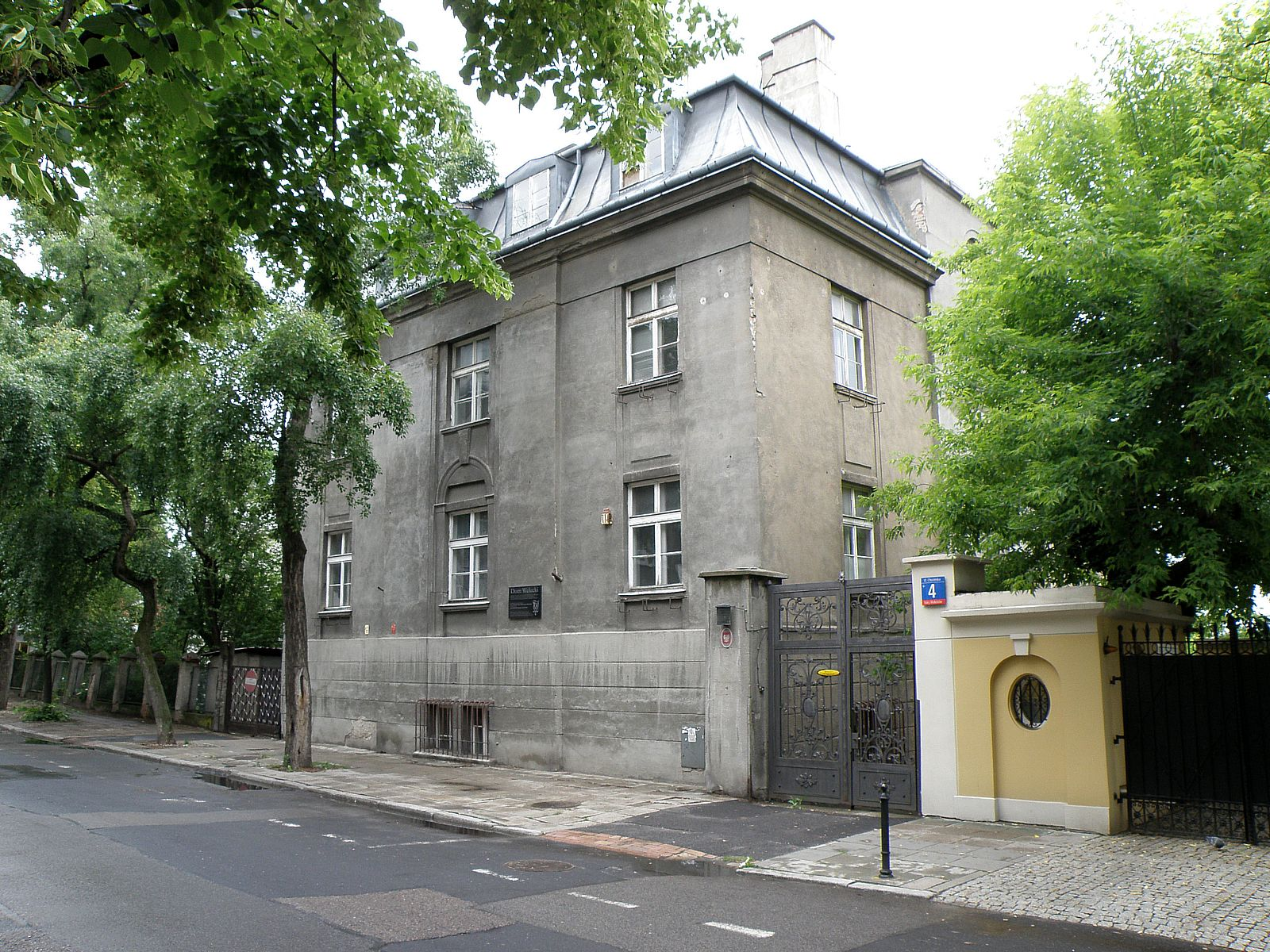 Welecja - Dom Welecki przy ul. Chocimskiej 4, AD 1928, projekt arch. Franciszek Lilpop, Edmund Michalski